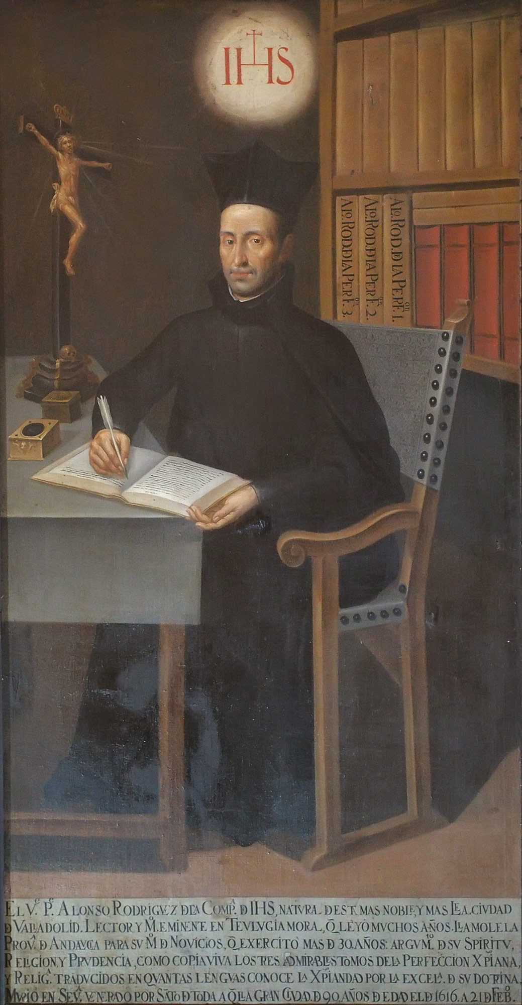 Alonso Rodríguez (1526-1616), teólogo.